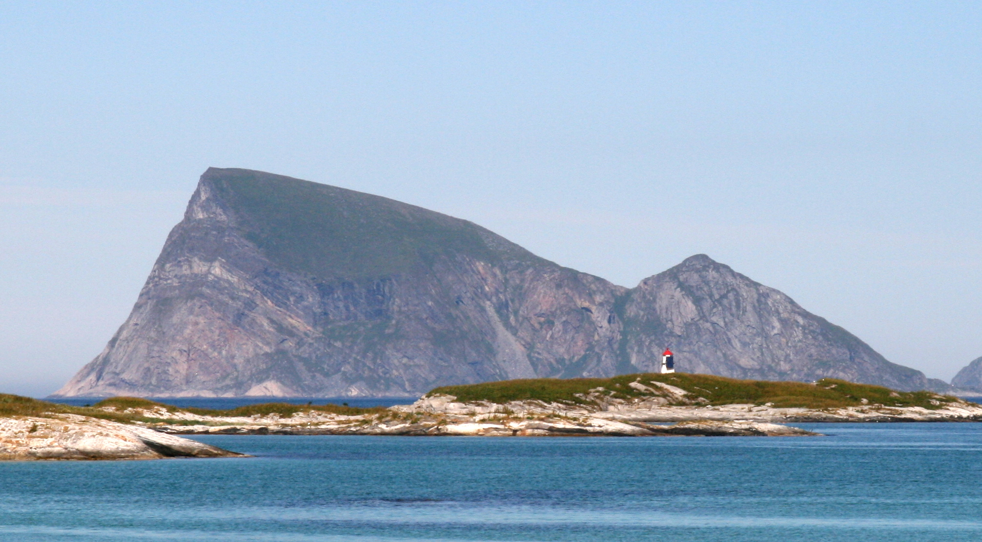 Håja i Troms.